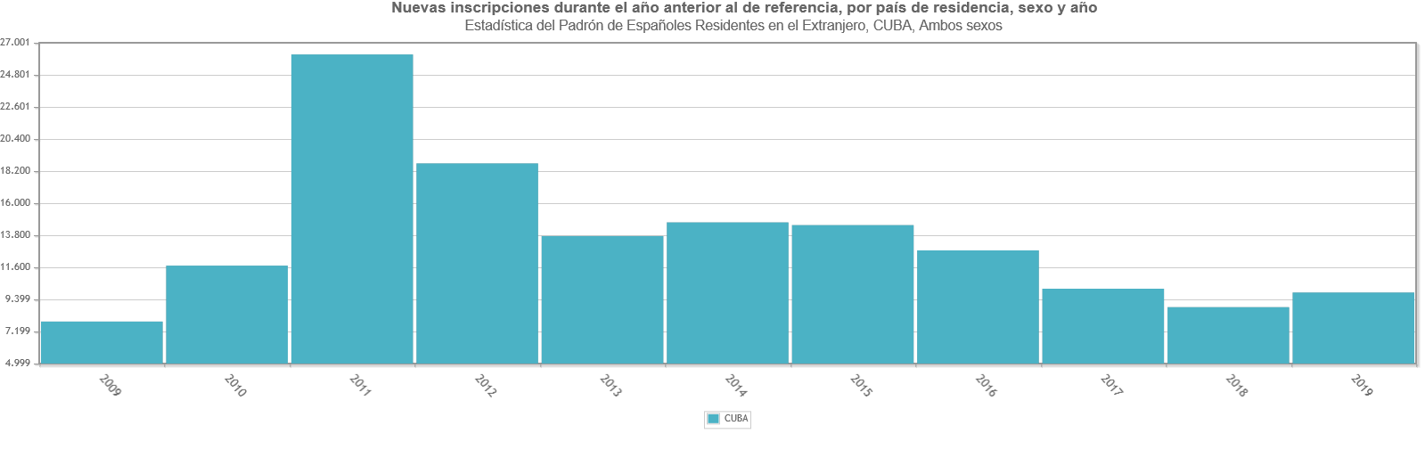 Estadística del Padrón de Españoles Residentes en el Extranjero, CUBA, Ambos sexos